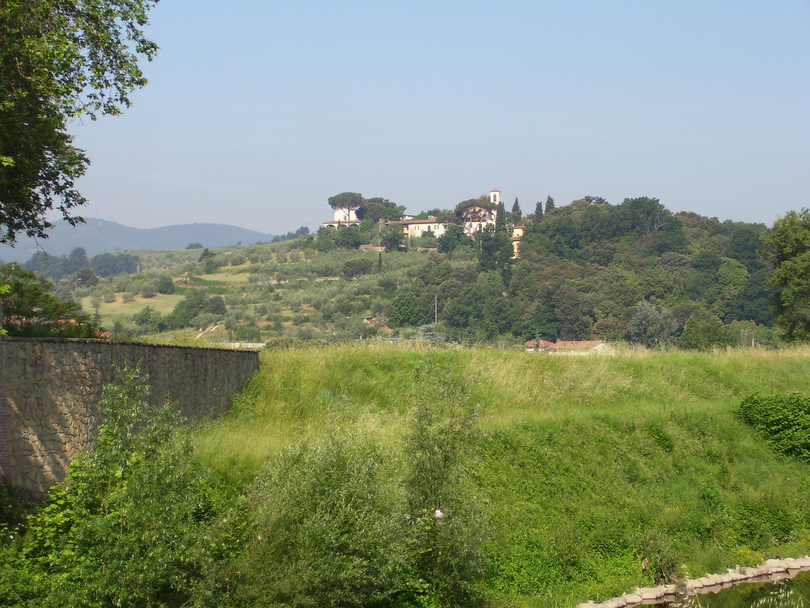 Bonistallo (Poggio a Caiano, visto dalla riva dell'Ombrone